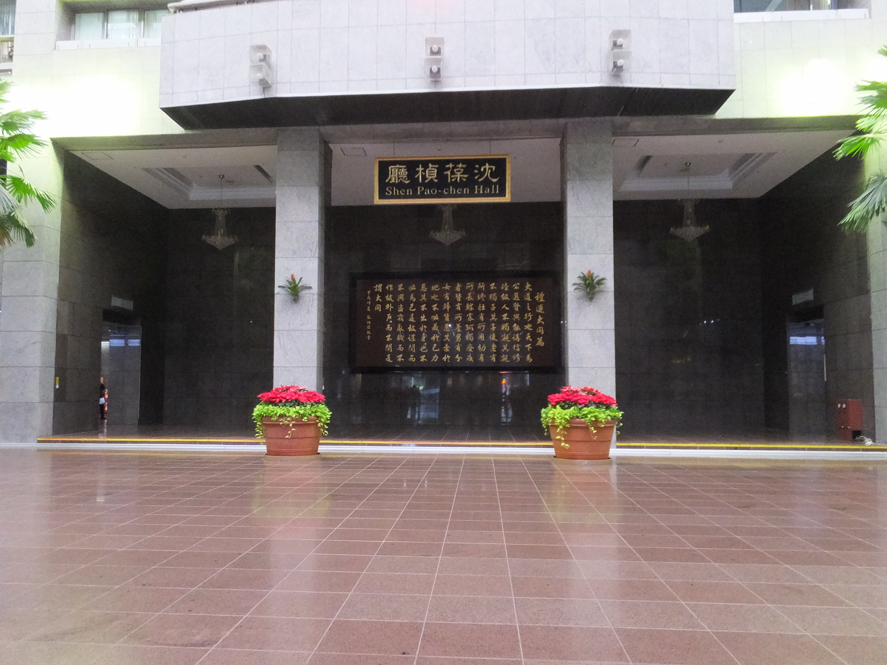 臺北市市政大樓1樓沈葆楨廳，沈葆楨廳牌匾與《禮記》禮運大同篇張炳煌書法刻石。